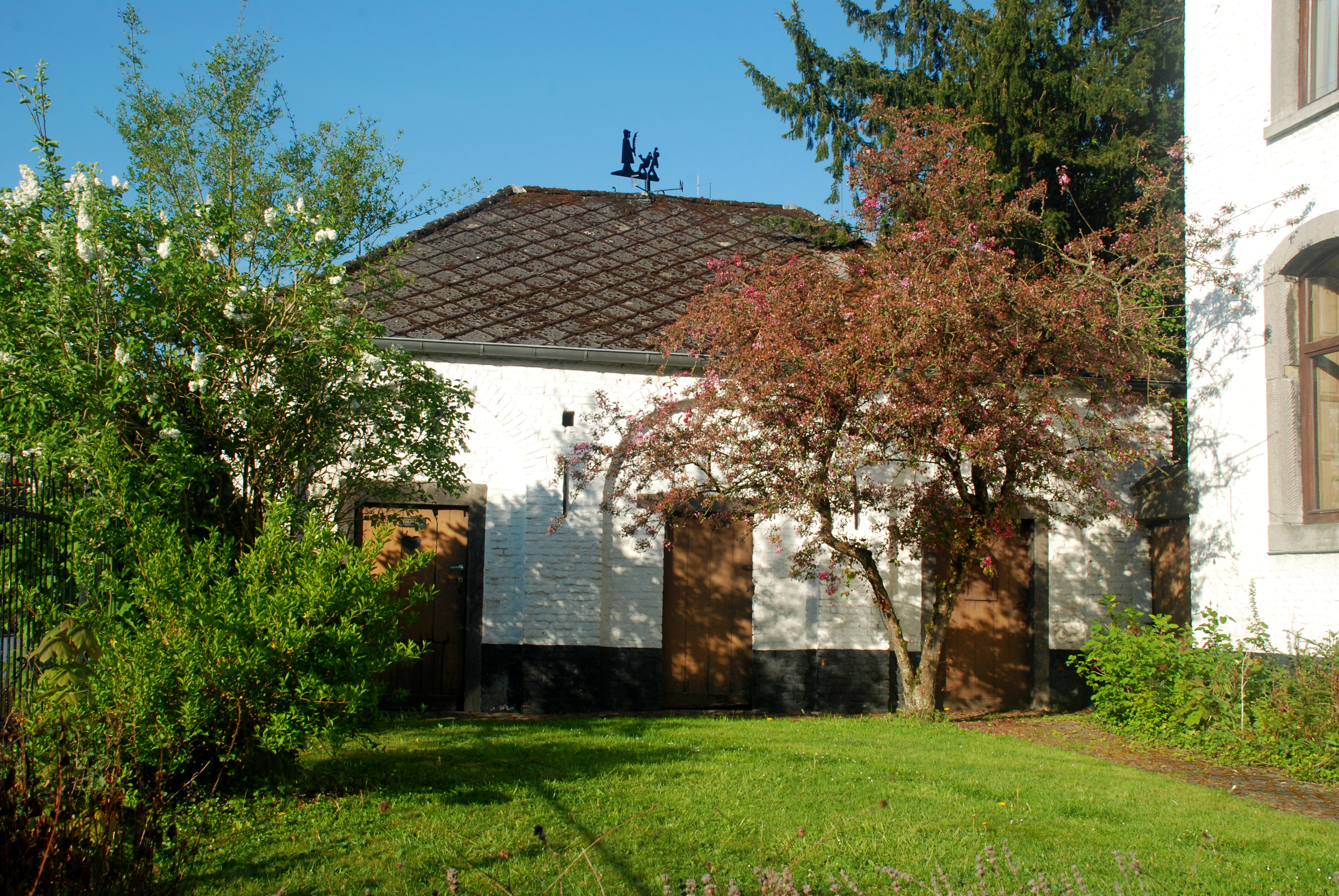 Belgique - Brabant wallon - Église de Court-Saint-Étienne - Cure